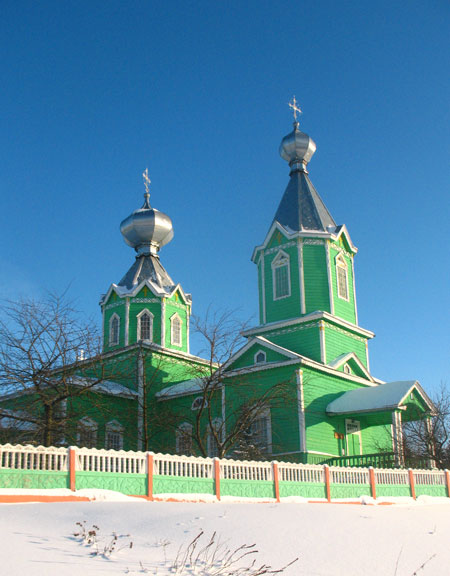 Стары Крупец. Троіцкая царкваБеларуская (тарашкевіца): Троіцкая царква (сярэдзіна XIX стагодзьдзя) This is a photo of Belarusian heritage monument. Reference number: 313Г000275 ( WLM)